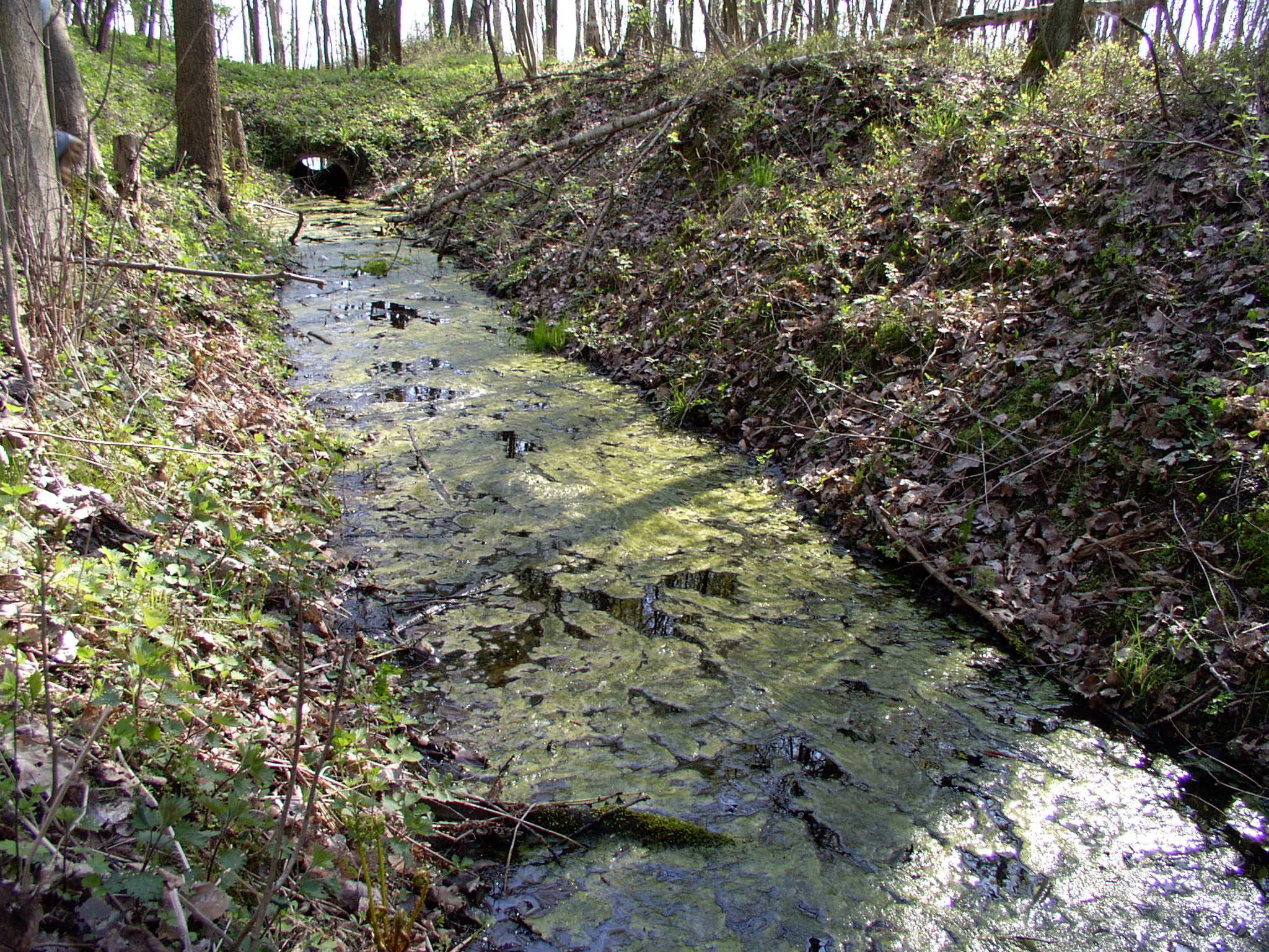 Jaroty, Olsztyn, rów na dawnym torfowisku w lesie